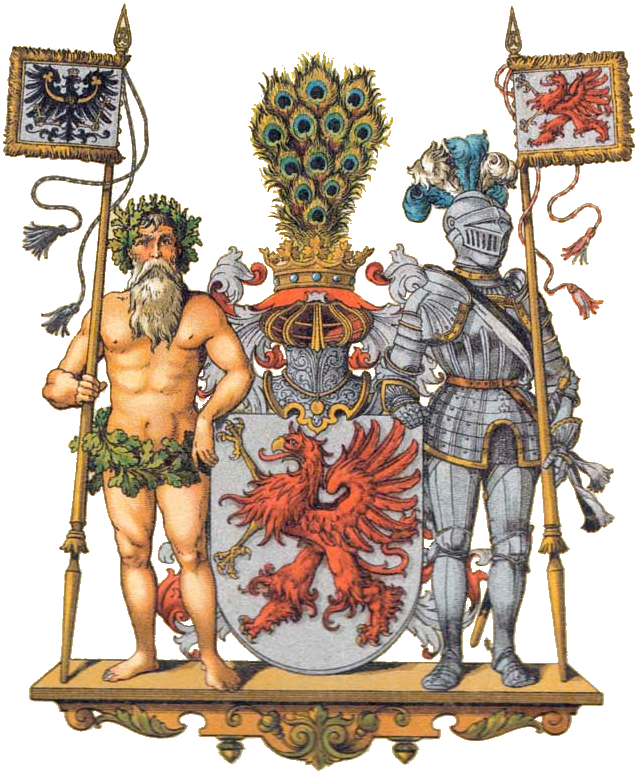 Provinz Pommern. Wappen der Provinz Pommern 1881.